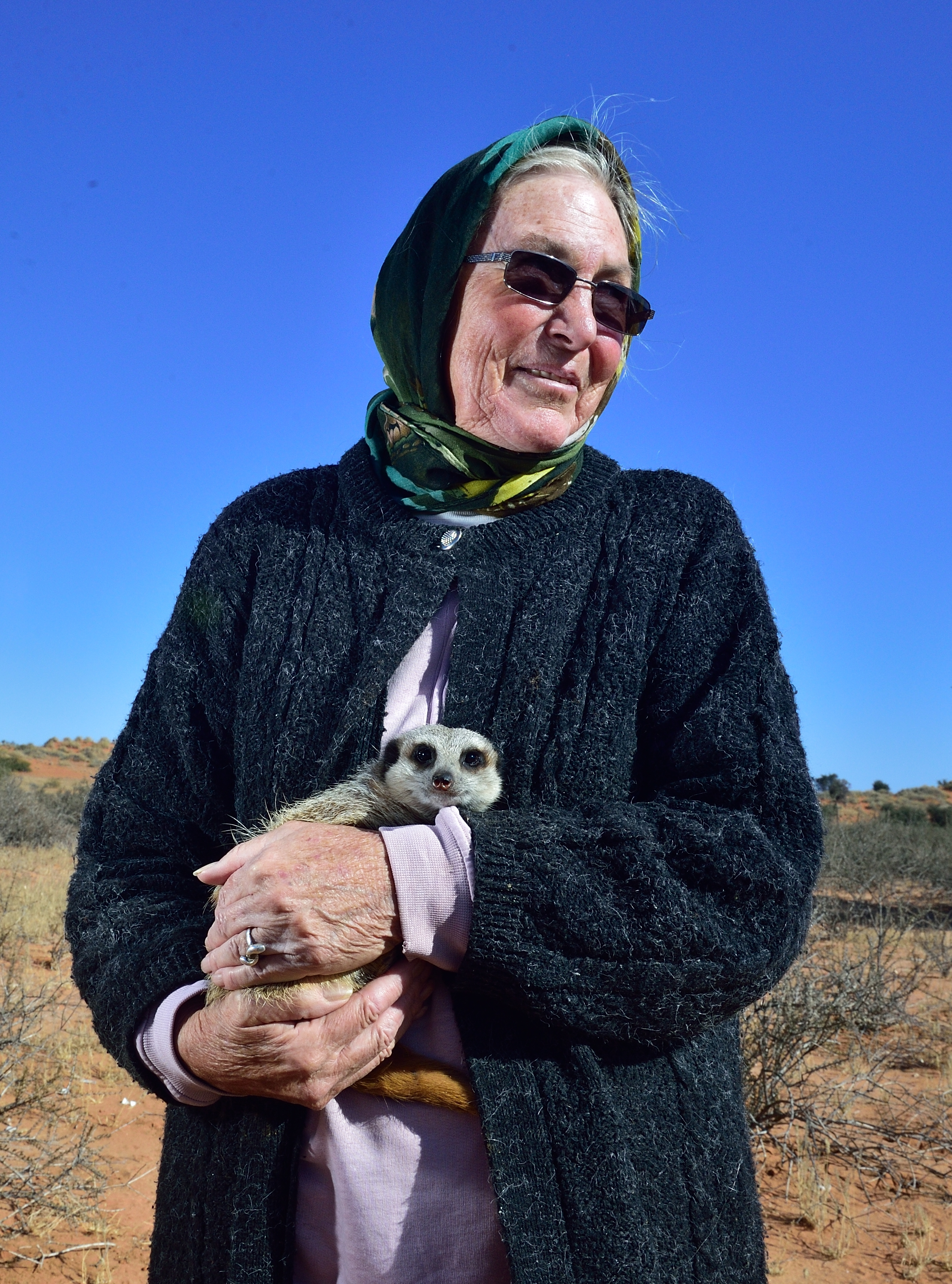 Vue de Northern Cape en Afrique du Sud.